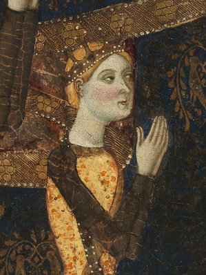 La obra muestra a la Virgen María llevando en sus brazos al Niño Jesús, y a sus pies aparecen el rey Enrique II de Castilla y el infante Juan, que llegaría a reinar como Juan I de Castilla, y también la reina Juana Manuel de Villena junto a una de sus hijas, que tal vez sea Leonor o Juana.